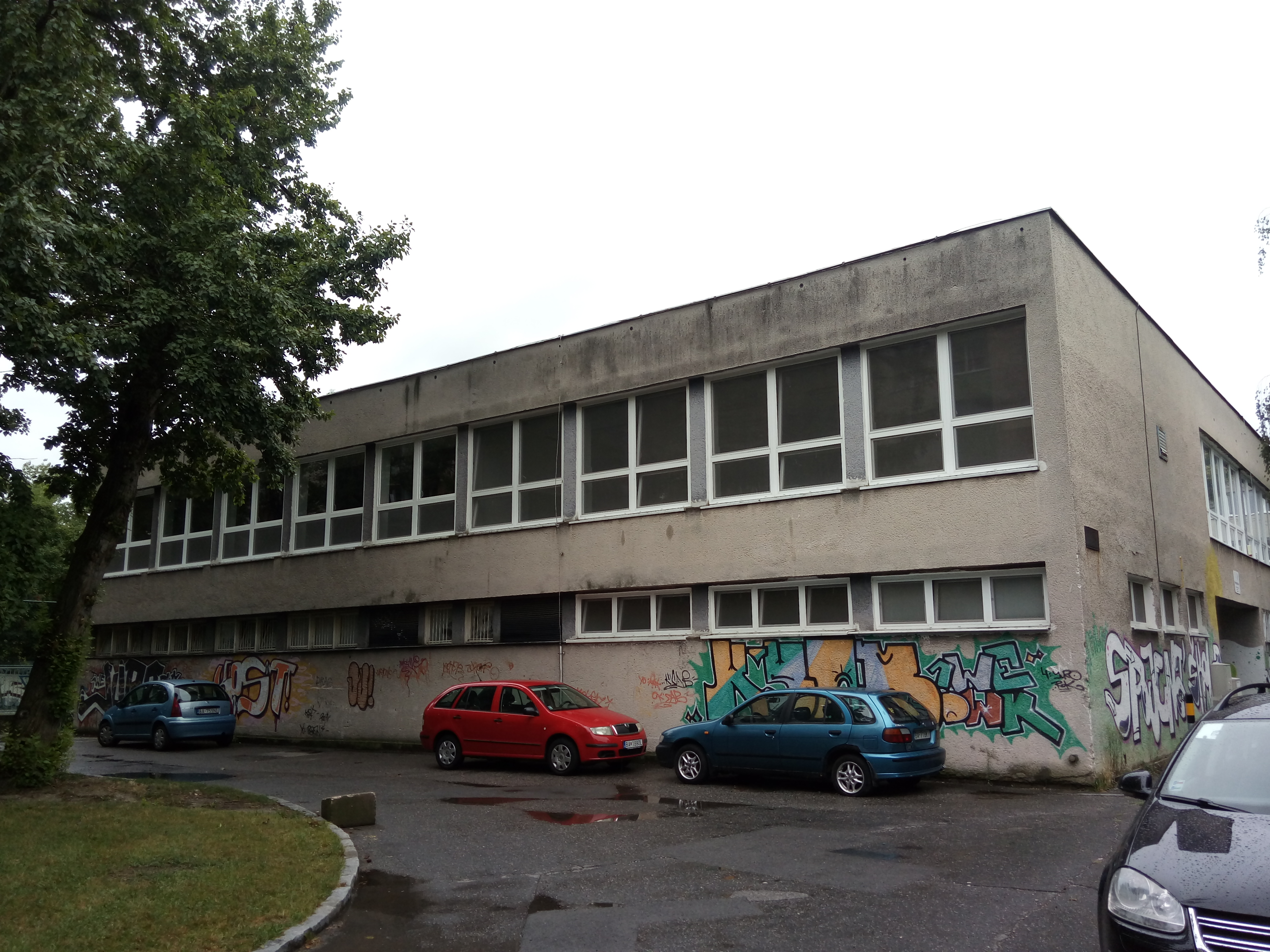 Bachova 4, Ružinov, Bratislava